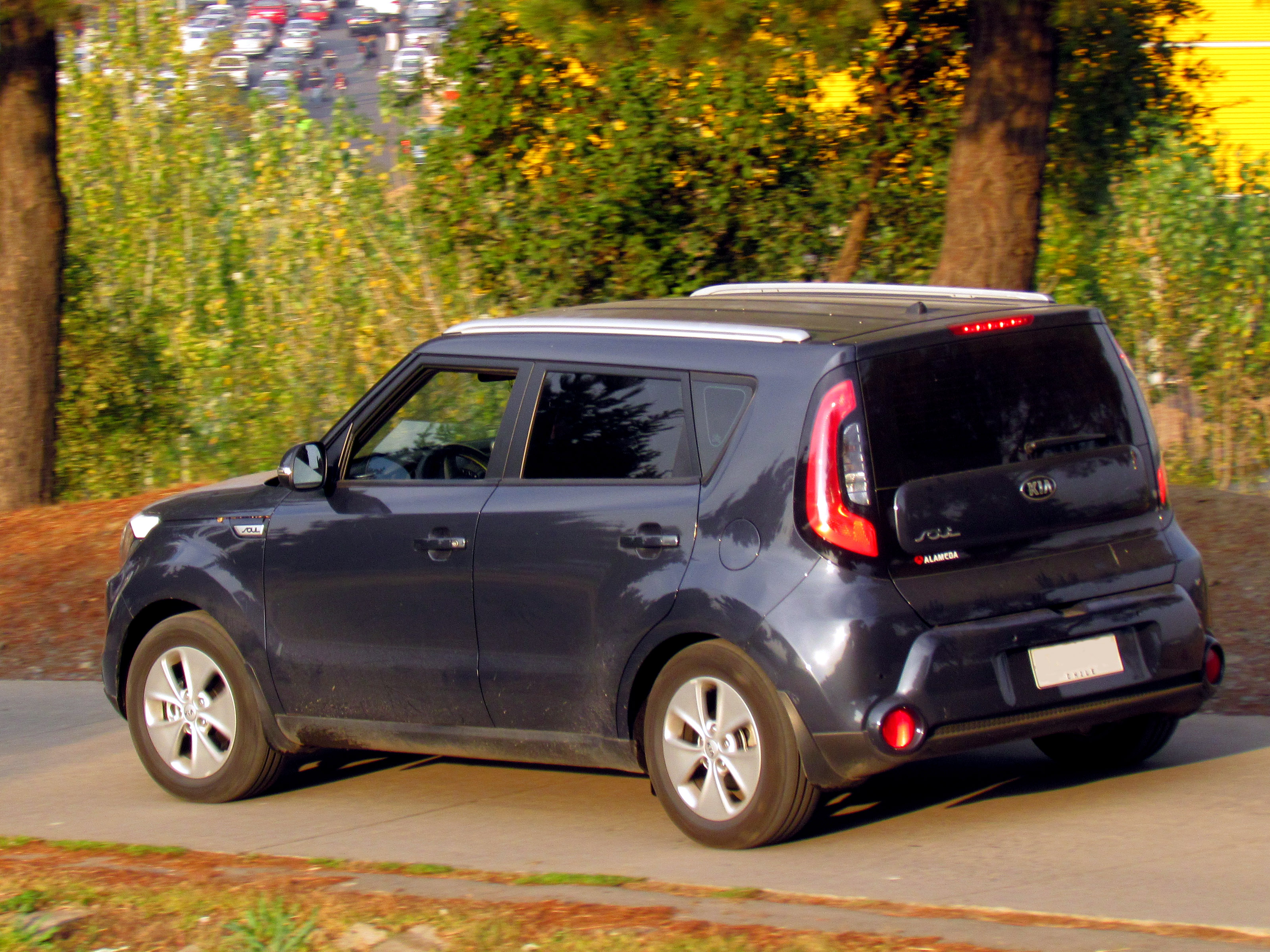 Kia Soul 1.6 EX 2015